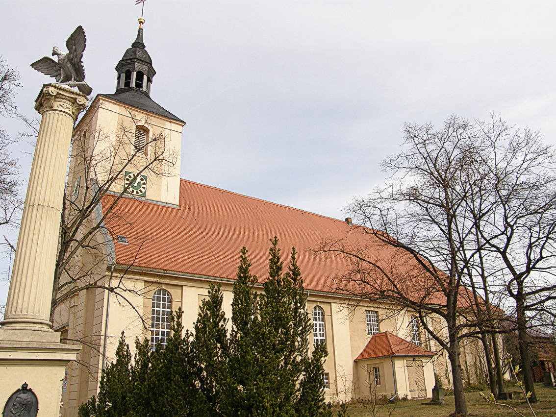 Die Kirche in Burg (Spreewald) von Außen